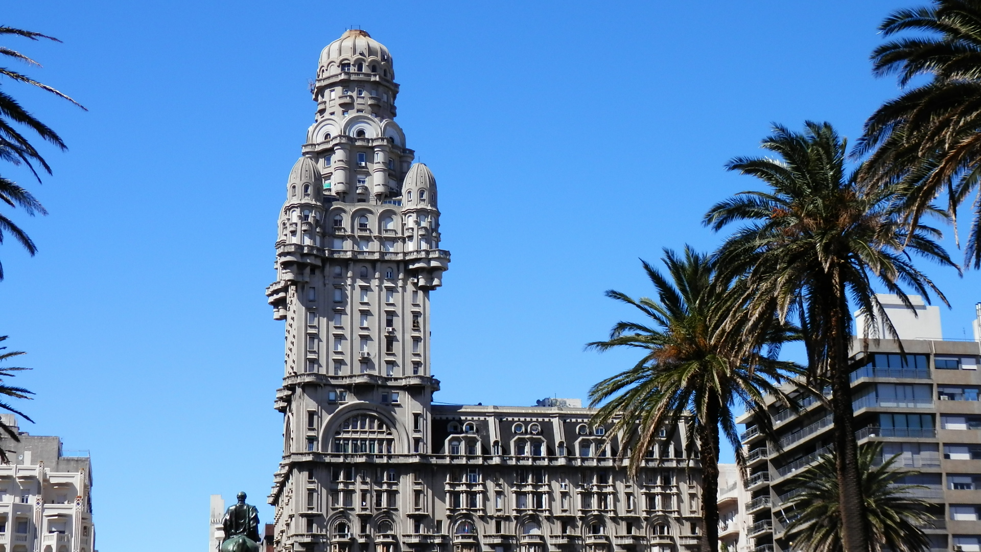 Palacio Salvo. Ubicada en el departamento de Montevideo